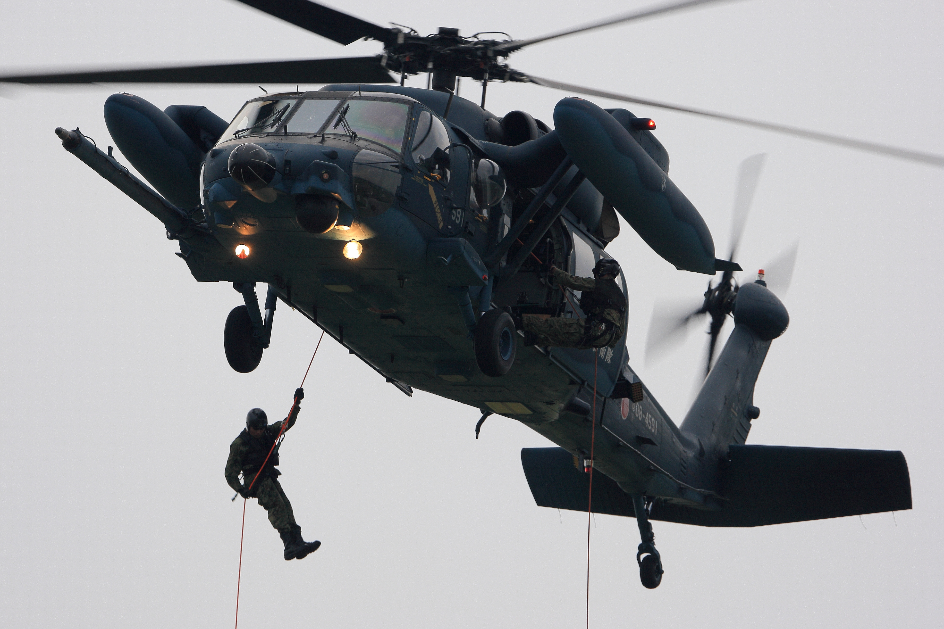 救難展示を行なう航空自衛隊小松救難隊のUH-60J